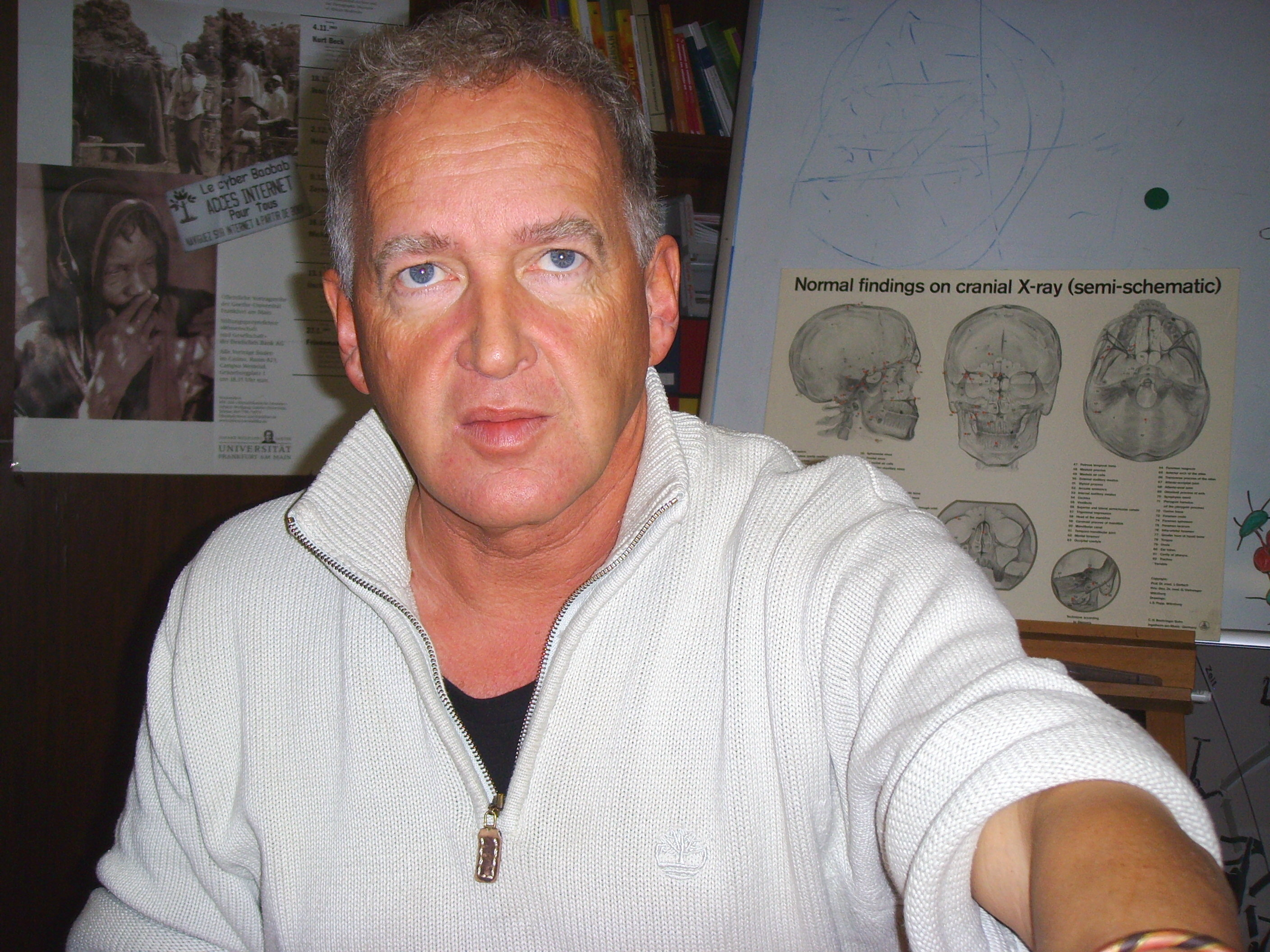 Prof. Friedemann Schrenk, German palaeoanthropologist. Senckenberg-Museum, Frankfurt am Main, Germany.